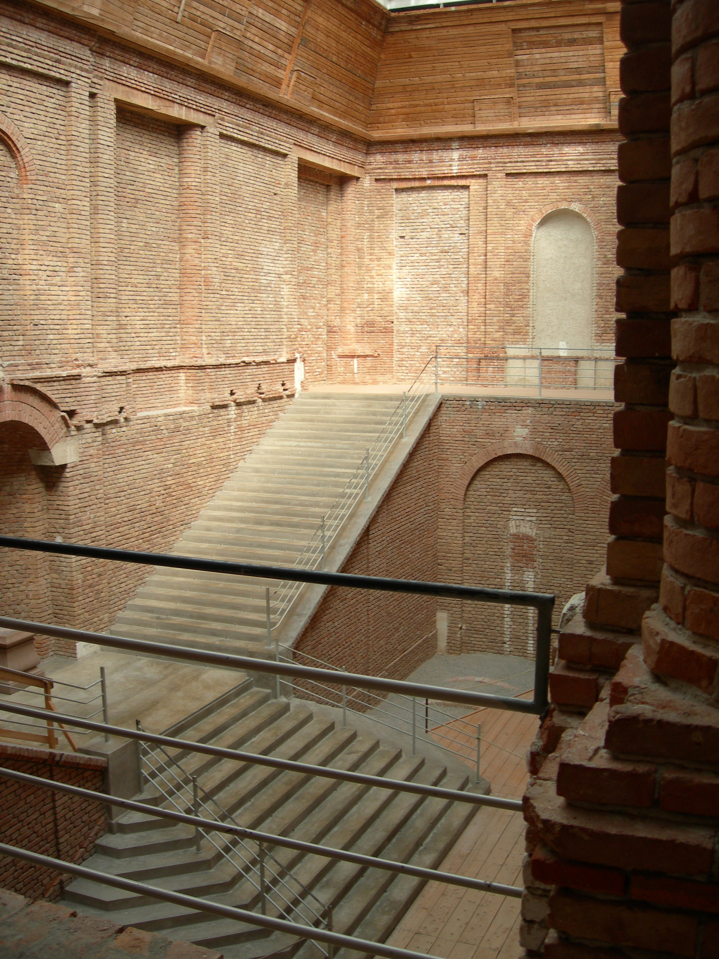 Schloss Herrenchiemsee, das unvollendete Treppenhaus. Eigene Aufnahme